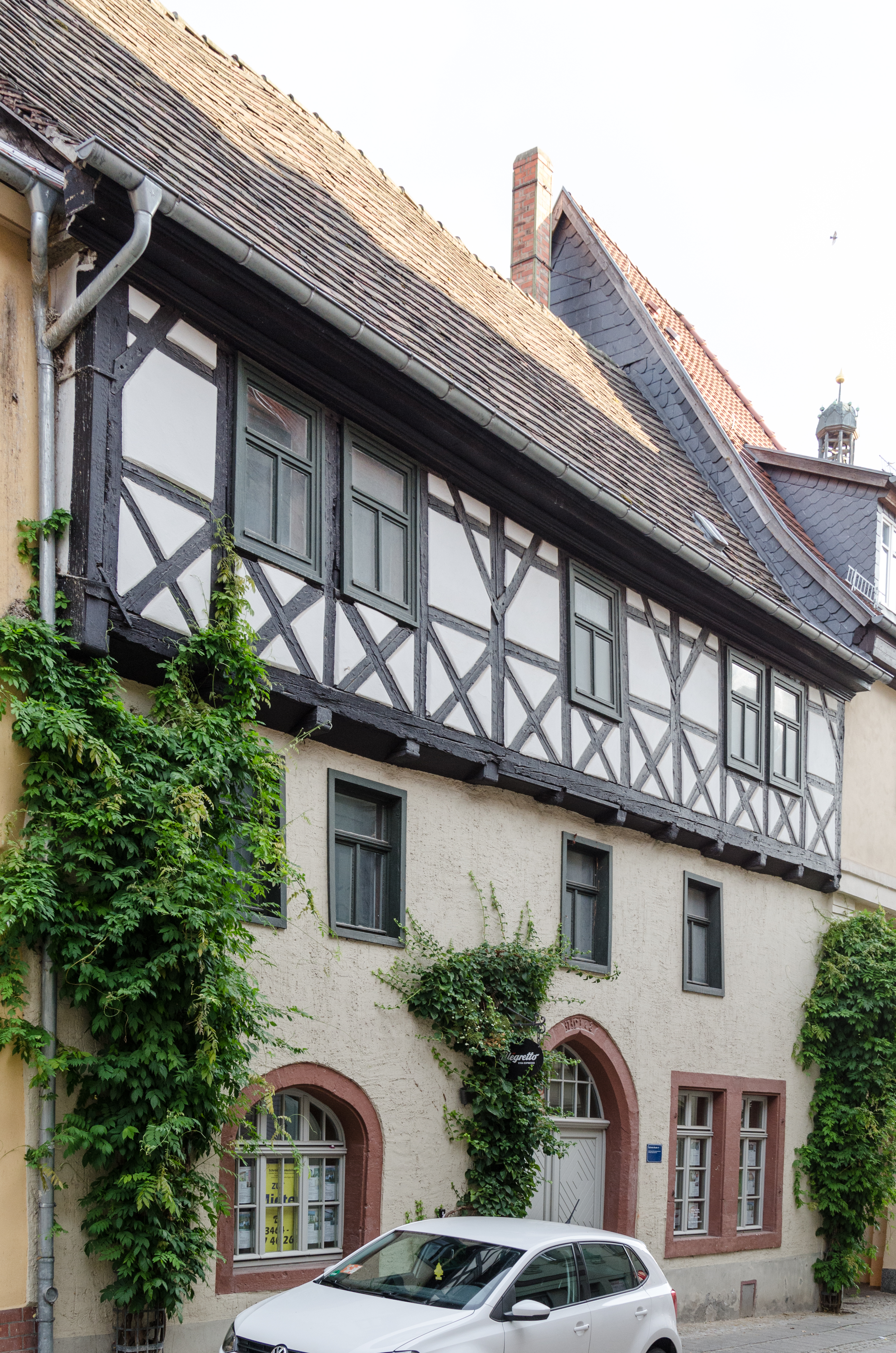 Sangerhausen, Kyllische Straße 17